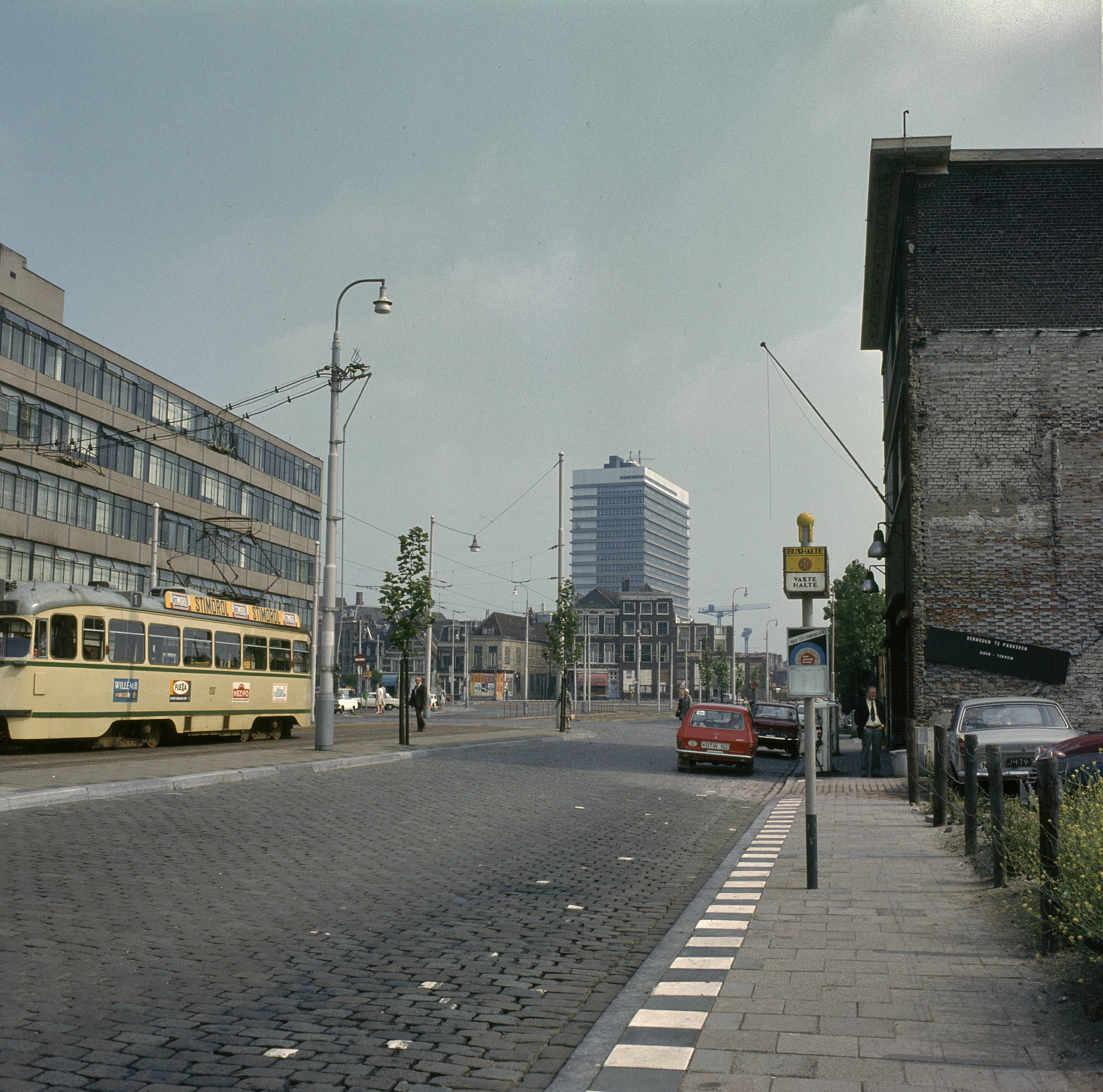 Overzicht